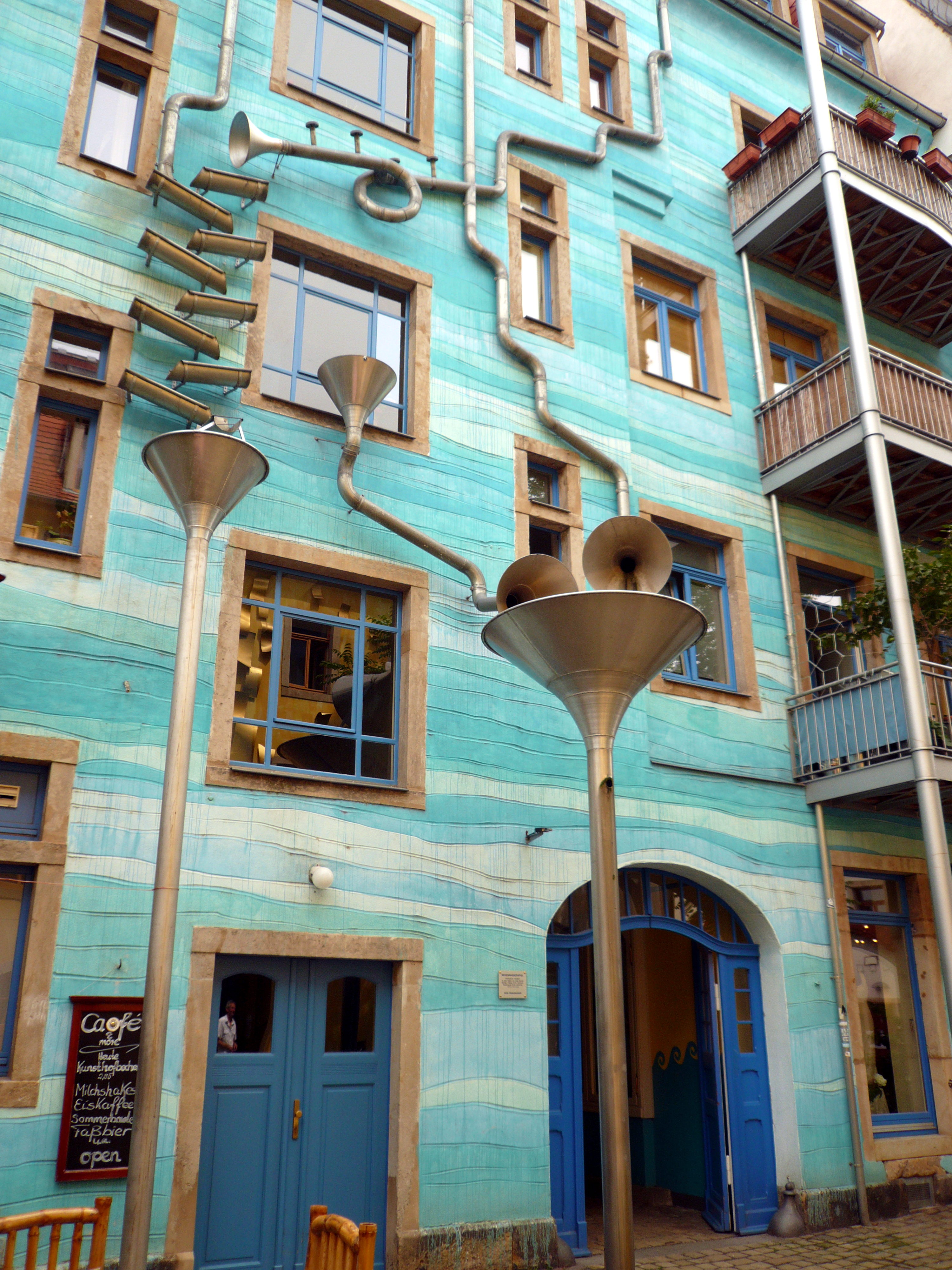 Une composition réalisée avec des gouttières artistiquement posées sur l'une des façades du passage des Arts (Kunsthofpassage)